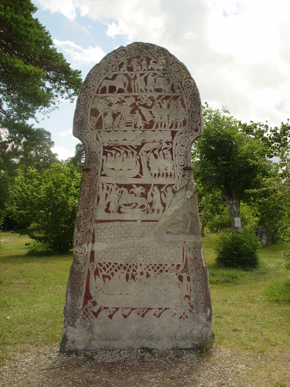 Bildstein im Freiluftmuseum Bunge (Gotland). Bezeichnung: Hammars I. Lärbro (700-talet e.Kr.), 300 cm hoch.